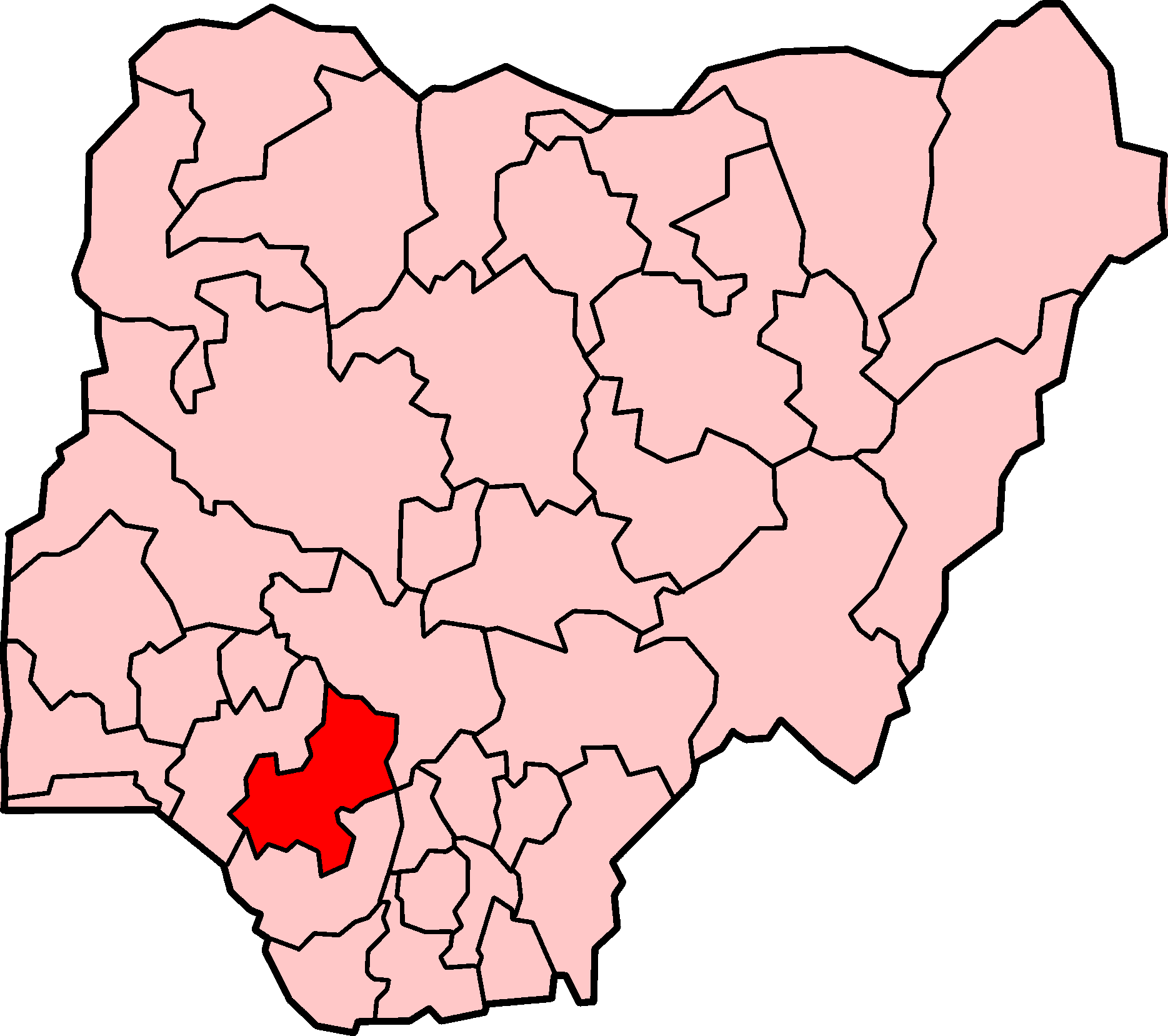 Localização do estado de Edo na Nigéria.